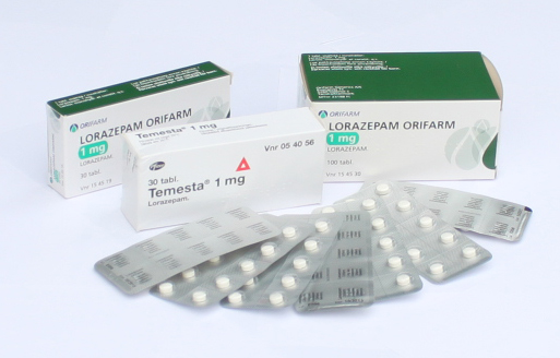 Loratsepaamiin perustuvia lääkkeitä